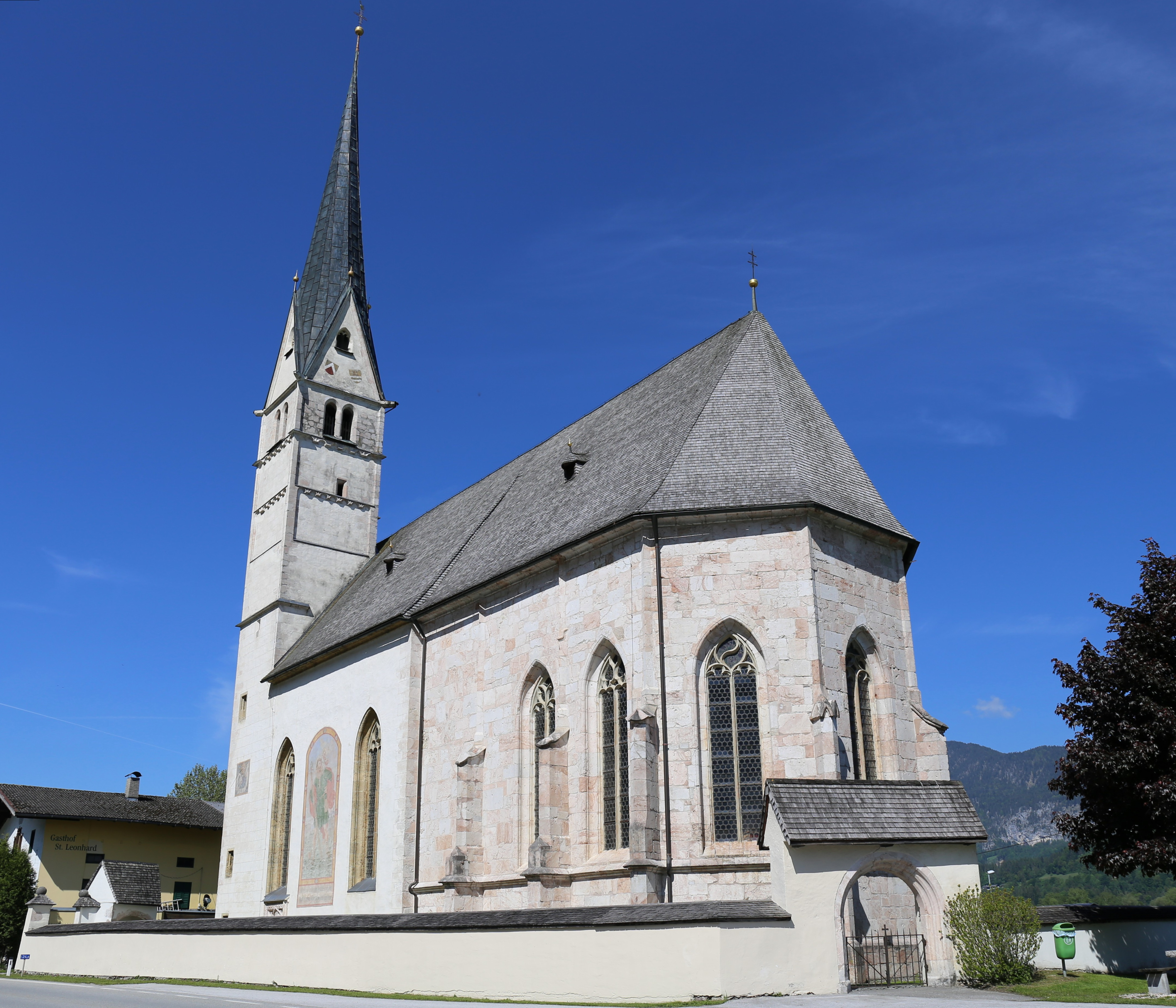 Filialkirche St. Leonhard (auf der Wiese) bei Kundl. Bei dieser Version wurde der Turm u. d. Ostwand gerader gestellt und links u. rechts etwas zugeschnitten